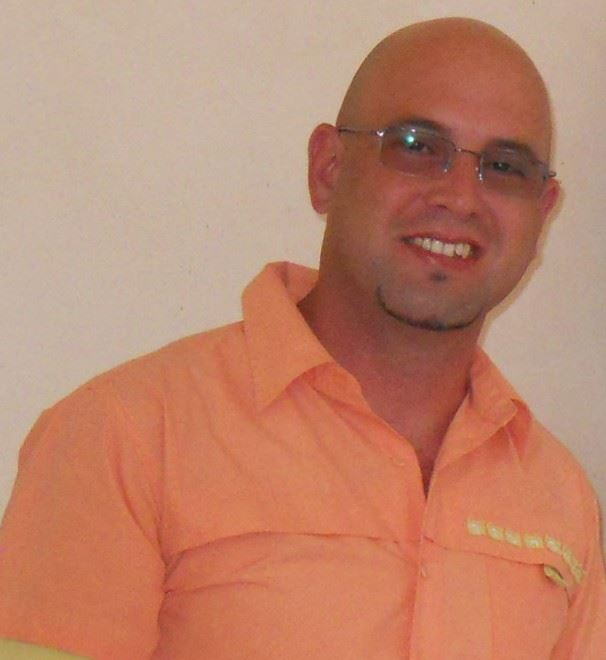 Osmán Avilés